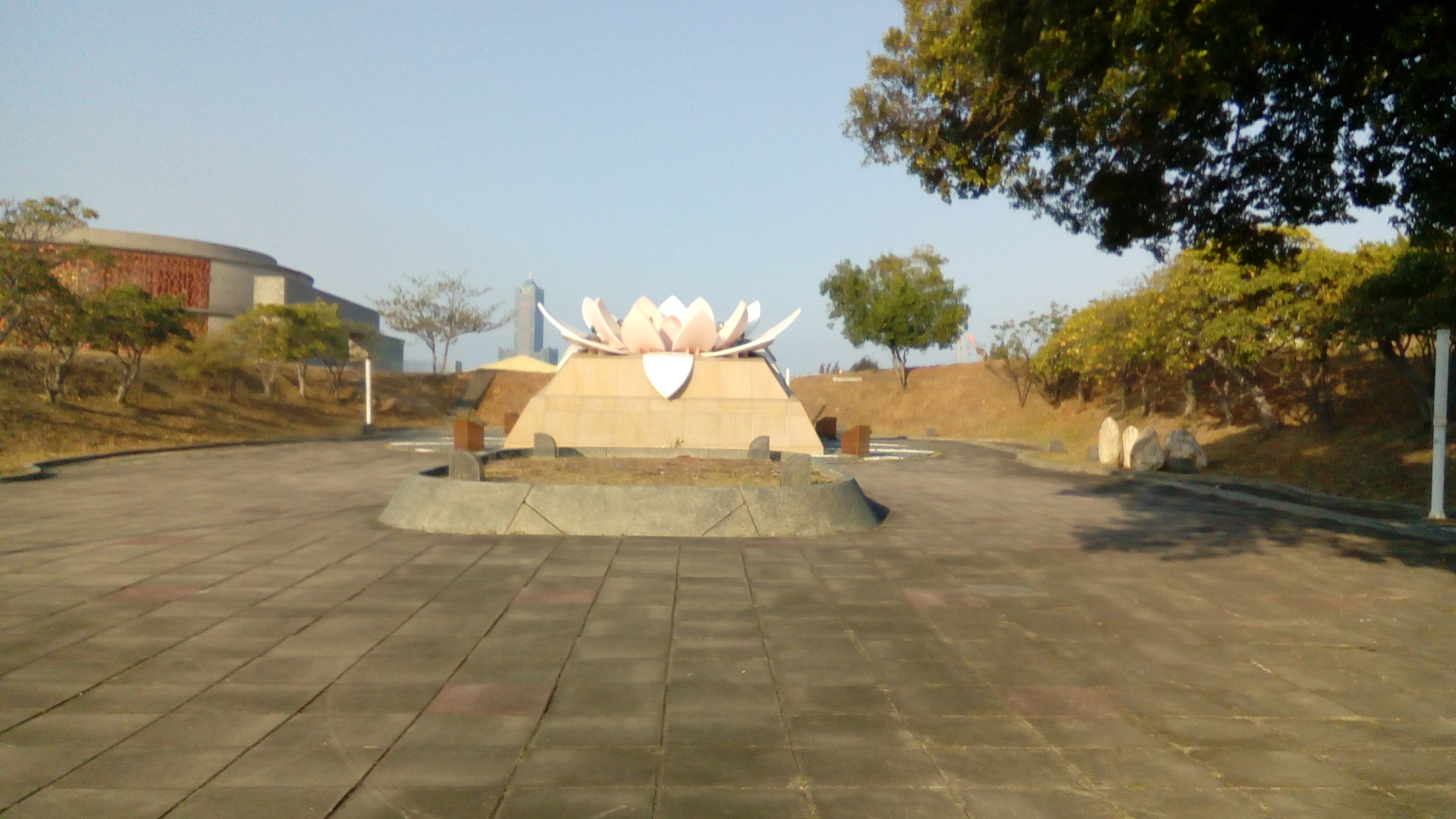 紀念出口擴張時期 因渡輪翻覆而不幸喪生的25名女性勞工所建